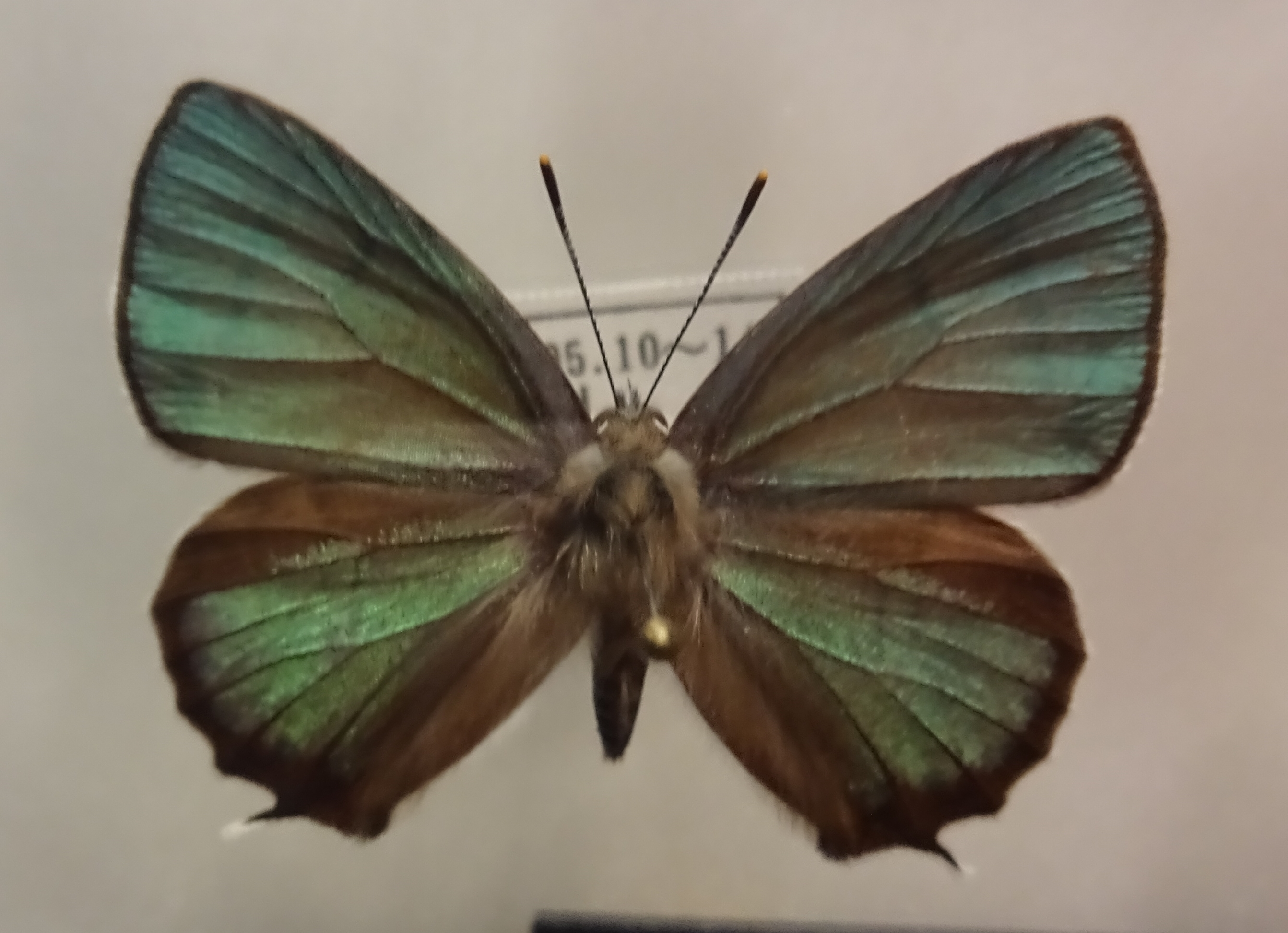 ウラジロミドリシジミ